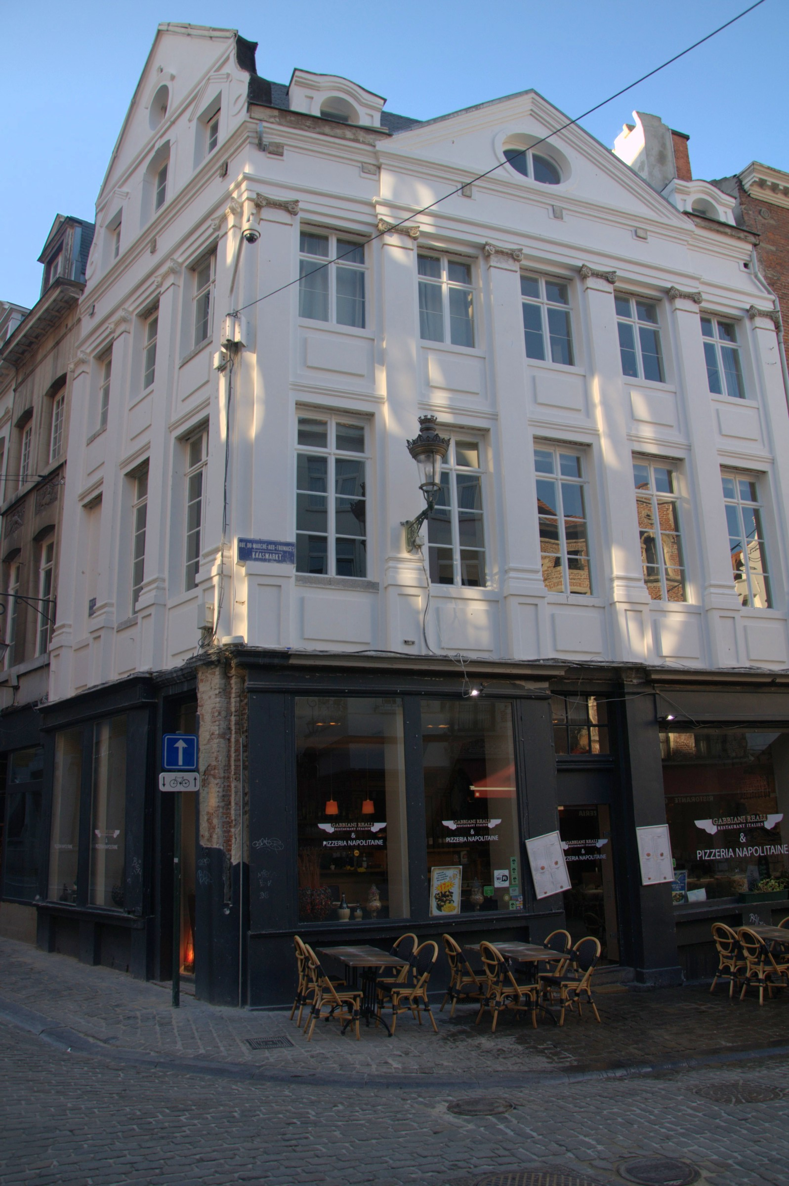 Patrimoine immobilier de Bruxelles